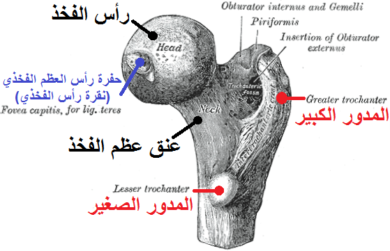 النهاية العلوية لعظم الفخذ الأيمن (عرض من الخلف ومن أعلى). يُرى فى الرسم : رأس الفخذ ، عنق عظم الفخذ ، المدور الكبير و المدور الصغير. Upper extremity of right femur viewed from behind and above.